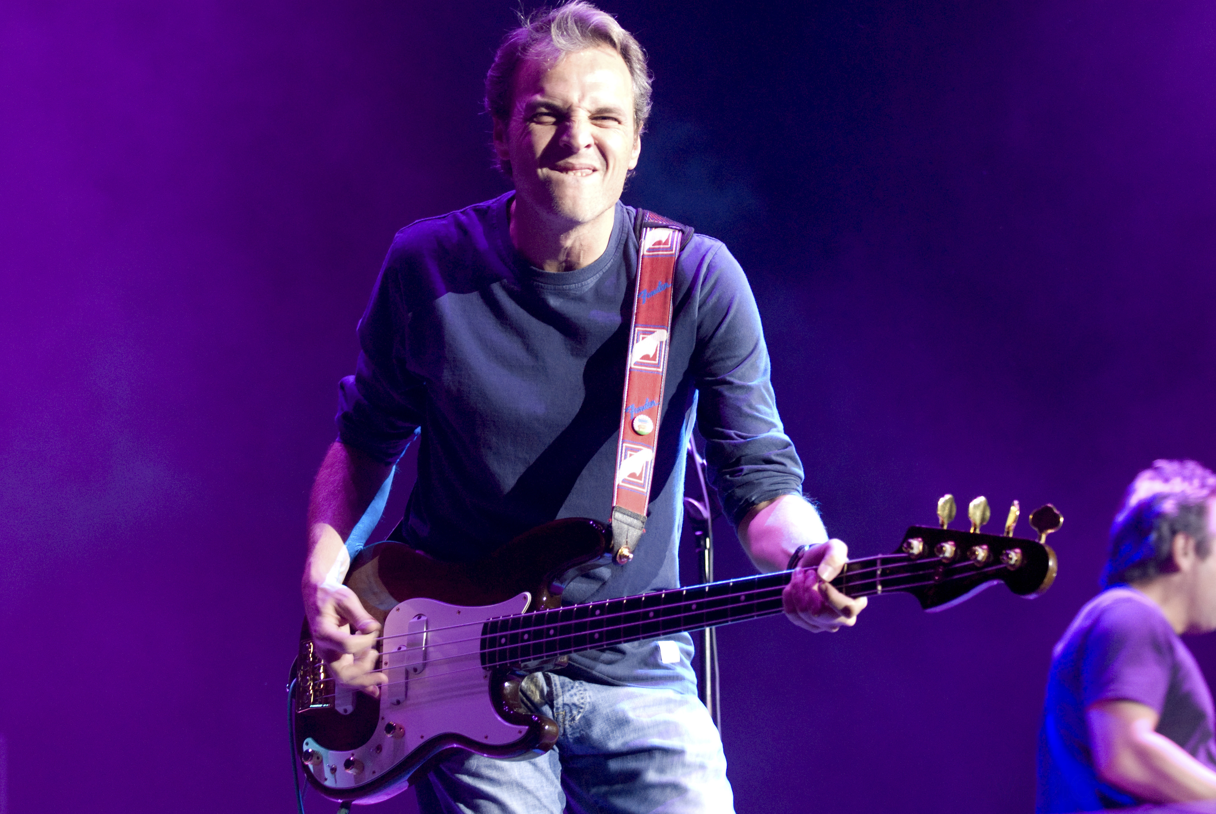 Hombres G